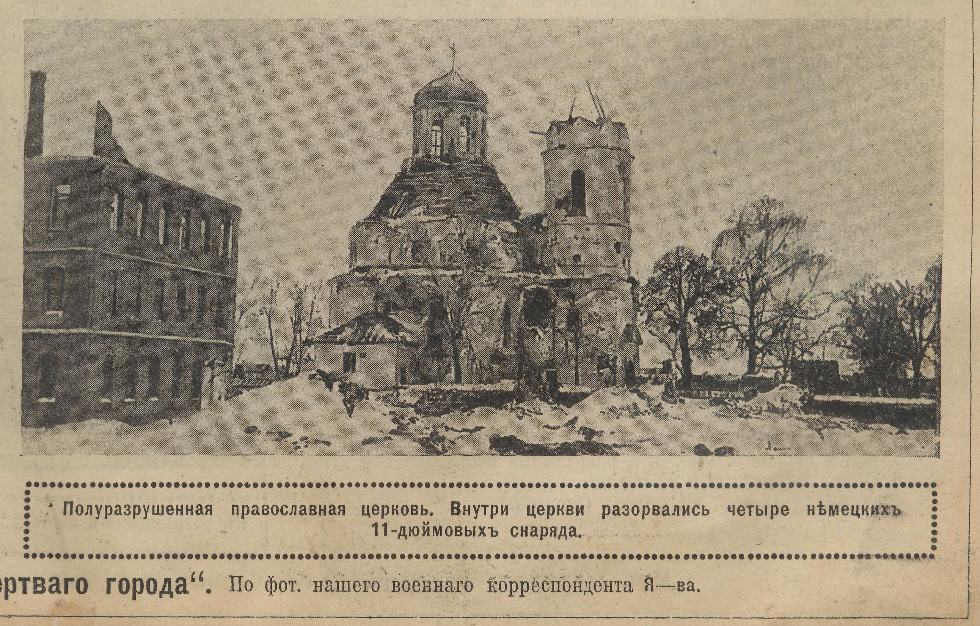 Разрушенная немецкими снарядами православная церковь в освобождённой русскими войсками Сморгони. Репортаж "Из мертваго города". "Нива" №25-1916